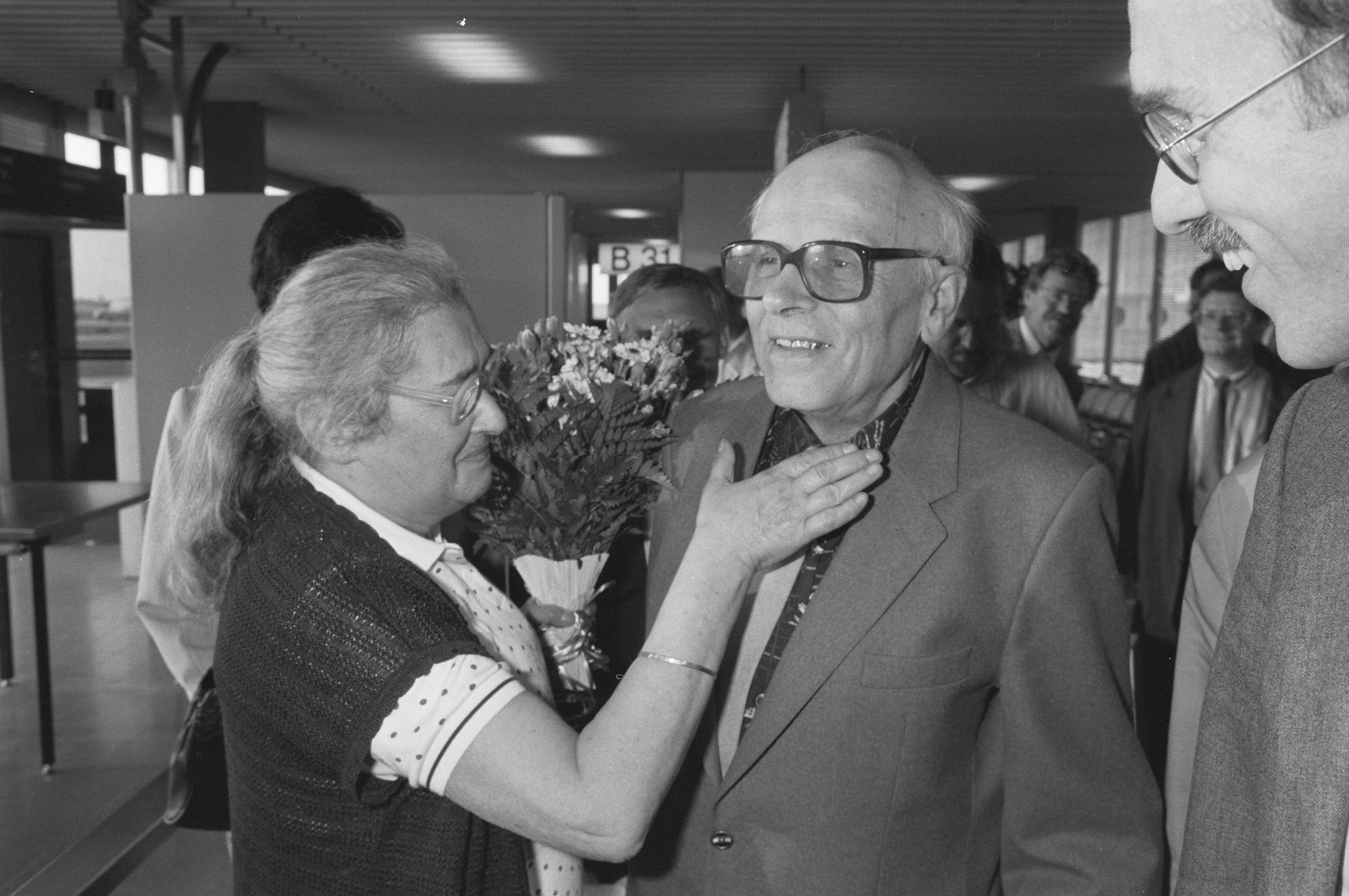 Aankomst op Schiphol van voorvechter van mensenrechten en hervormingen in de Sovjet-Unie Andrei Sacharov en zijn vrouw Jelena Bonner voor de uitreiking van het eredoctoraat in de rechtsgeleerdheid van de Rijksuniversiteit Groningen (NL), 15 juni 1989